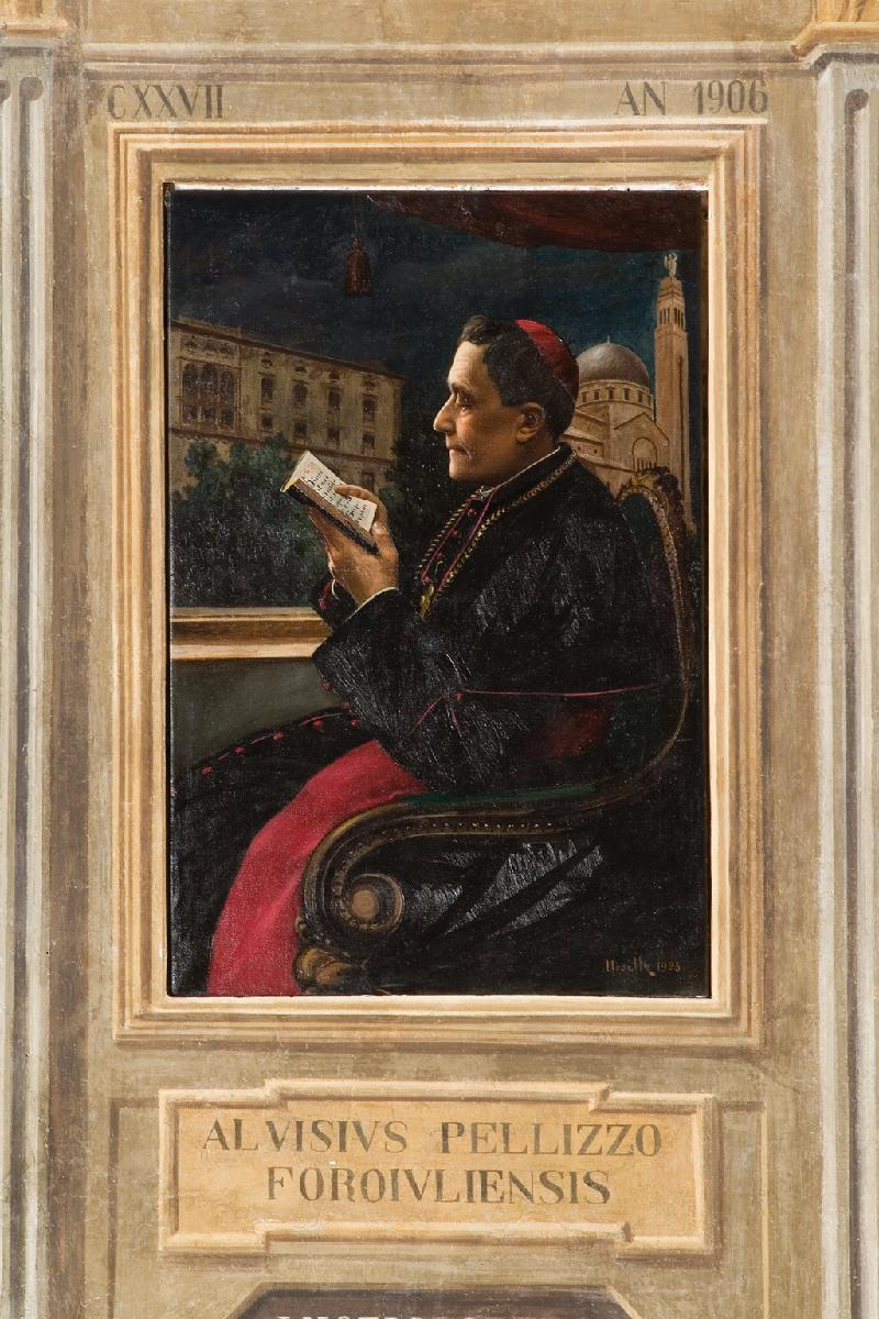 E. Ursella - Ritratto del vescovo Lugi Pellizzo - Sala dei Vescovi - Palazzo Vescovile - Padova